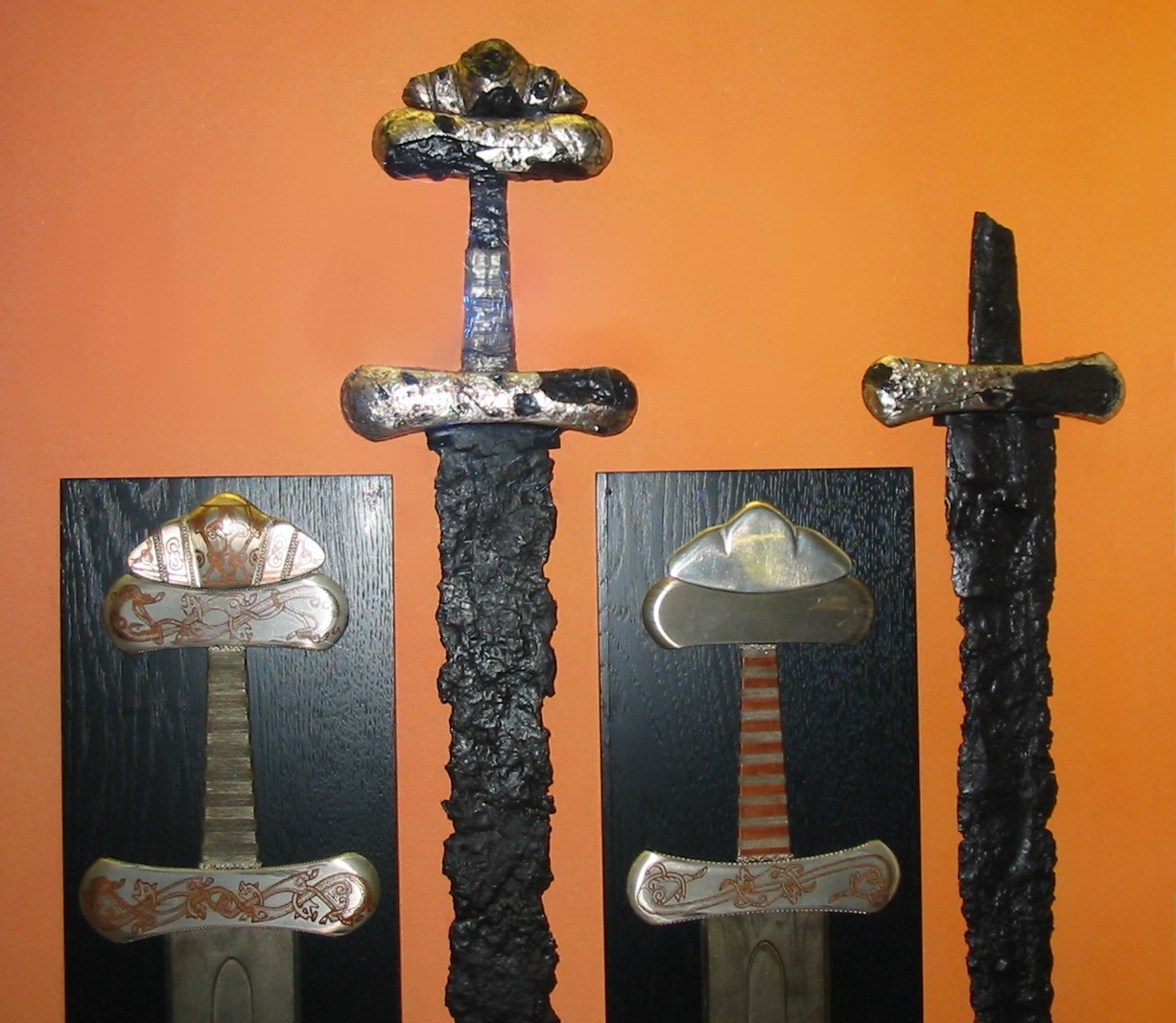 Two sword hilts on exhibit in Hedeby Museum. The sword on the left is from a Viking Age burial at Busdorf, Schleswig-Flensburg; Petersen type S, with silver and copper inlay work. Literature: Mechthild Schulze-Dörrlamm, "Schwerter des 10. Jahrhunderts als Herrschaftszeichen der Ottonen", Jahrbuch des Römisch-Germanischen Zentralmuseums 59 (2012) 609–651 (p. 625) [1] M. Müller-Wille, "Zwei wikingerzeitliche Prachtschwerter aus der Umgebung von Haithabu", Offa 29 (1972) 50-112.